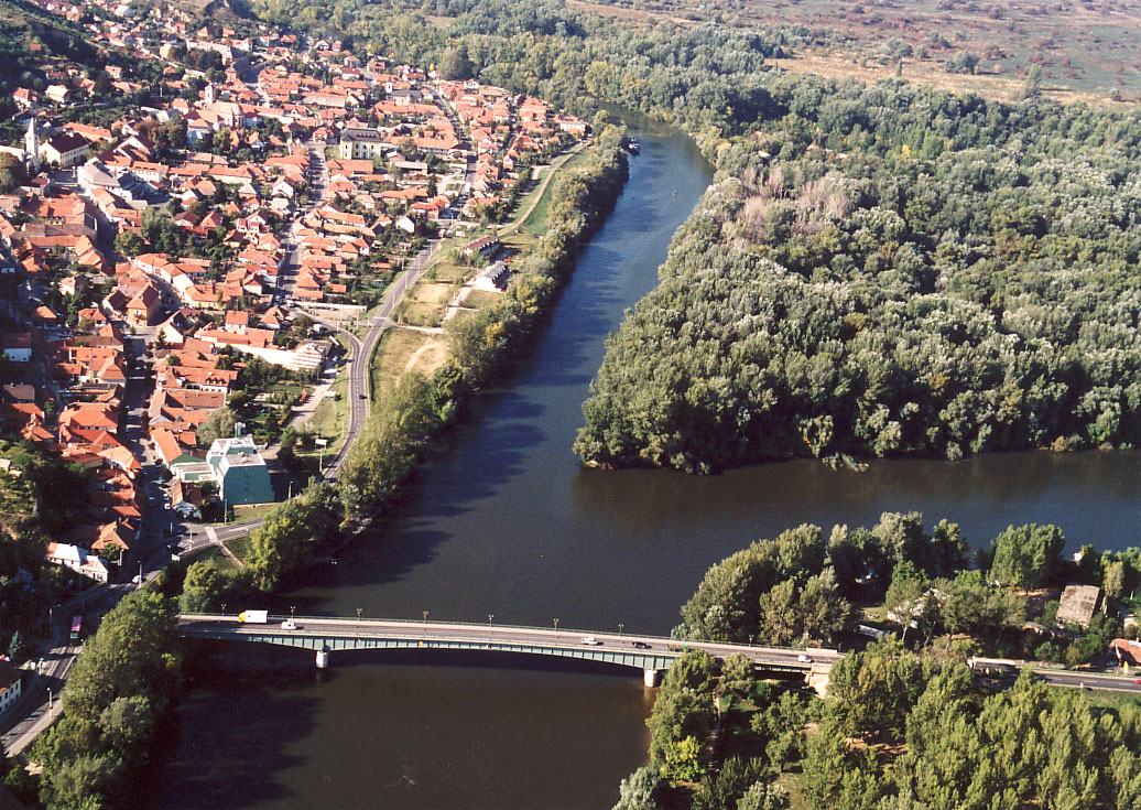 Tisza & Bodrog - River - Tokaj - Hungary - Europe